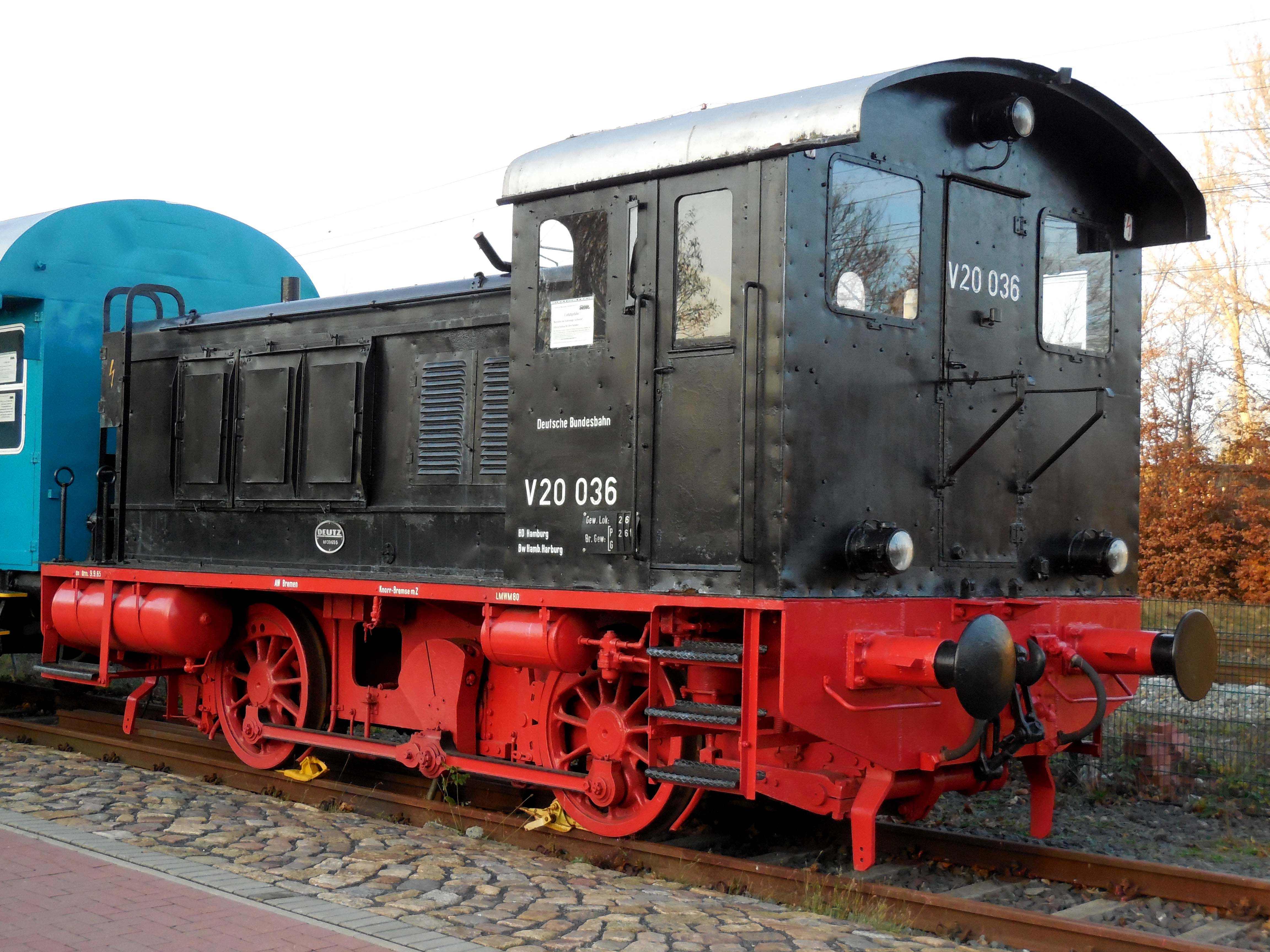 V 20 036 auf dem Bahnhof Glückstadt